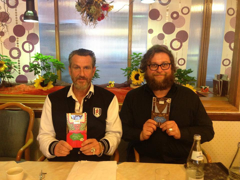 Thomas Kornack (rechts) mit Kai Maertens (links) bei den Internationalen Hofer Filmtagen 2013